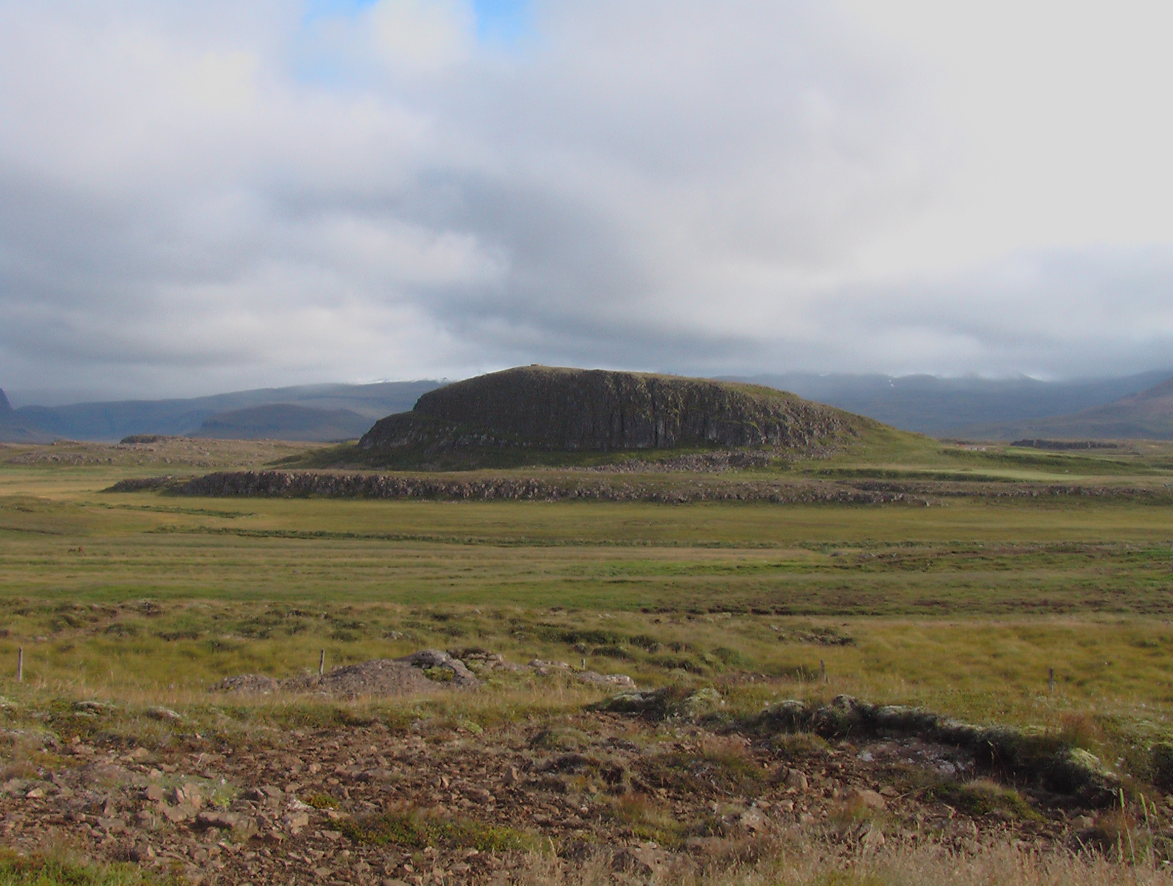 Helgafell í Helgafellssveit Iceland